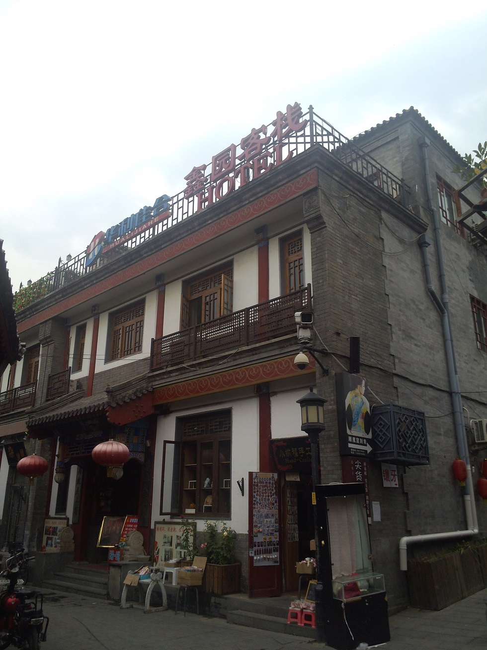 鑫园客栈正面